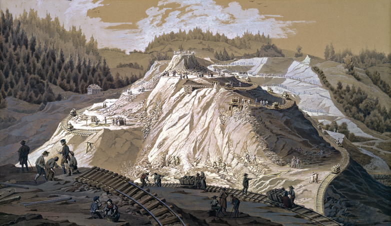 Rentershofener Bahndamm